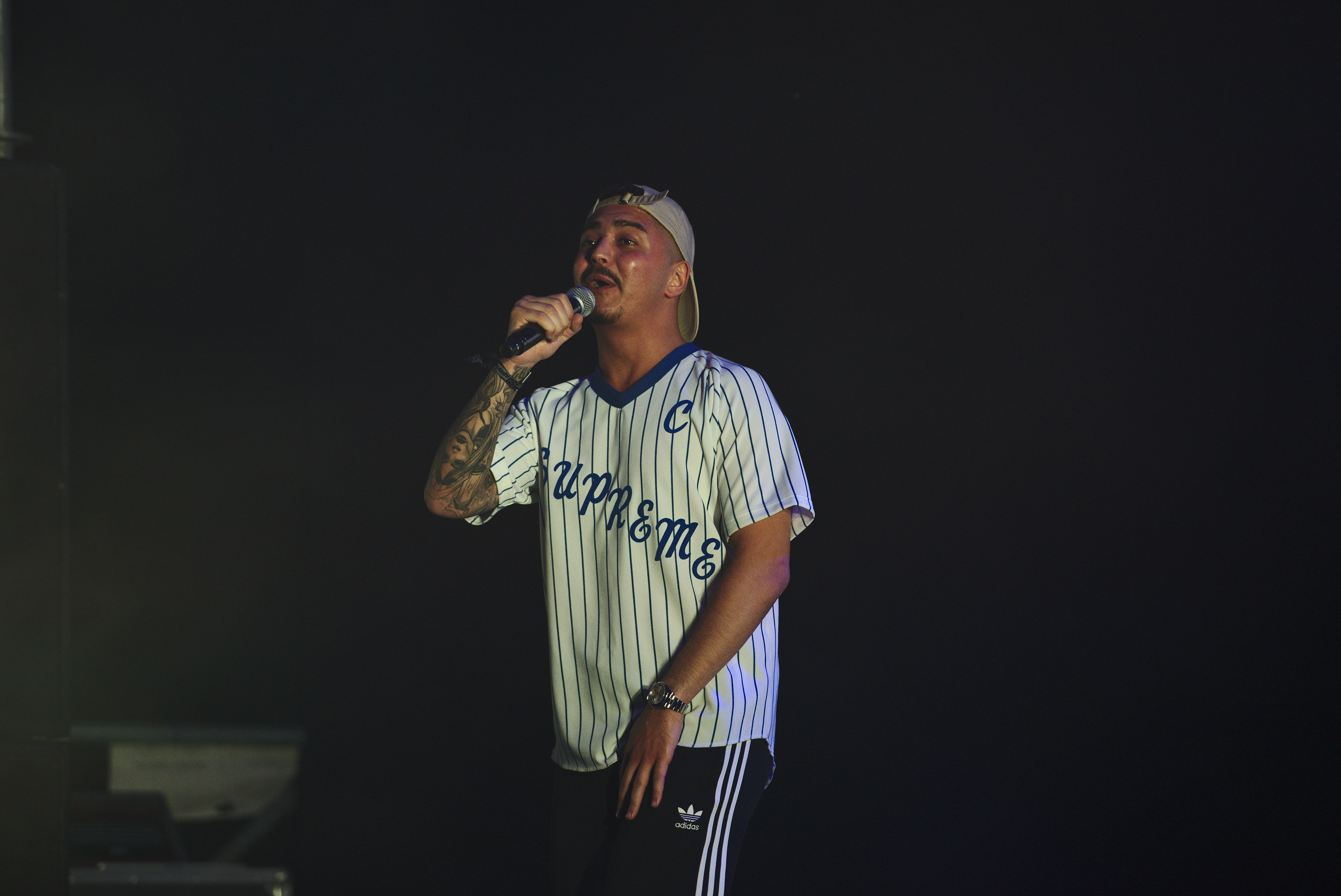 Der deutsche Rapper Kalim beim splash! Festival 20 (2017)